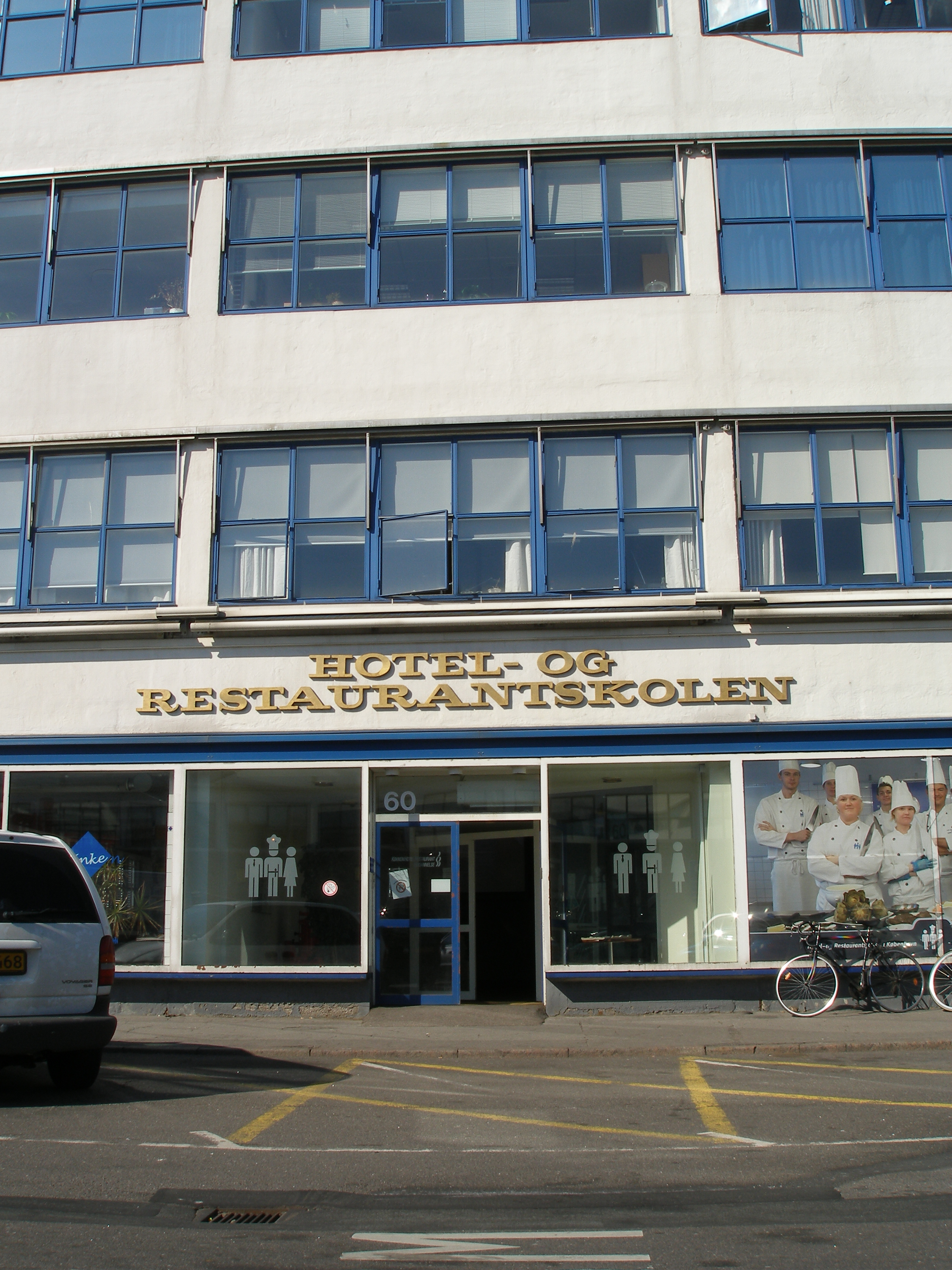 Hotel- og Restaurantskolen på Flæsketorvet, Kødbyen, København